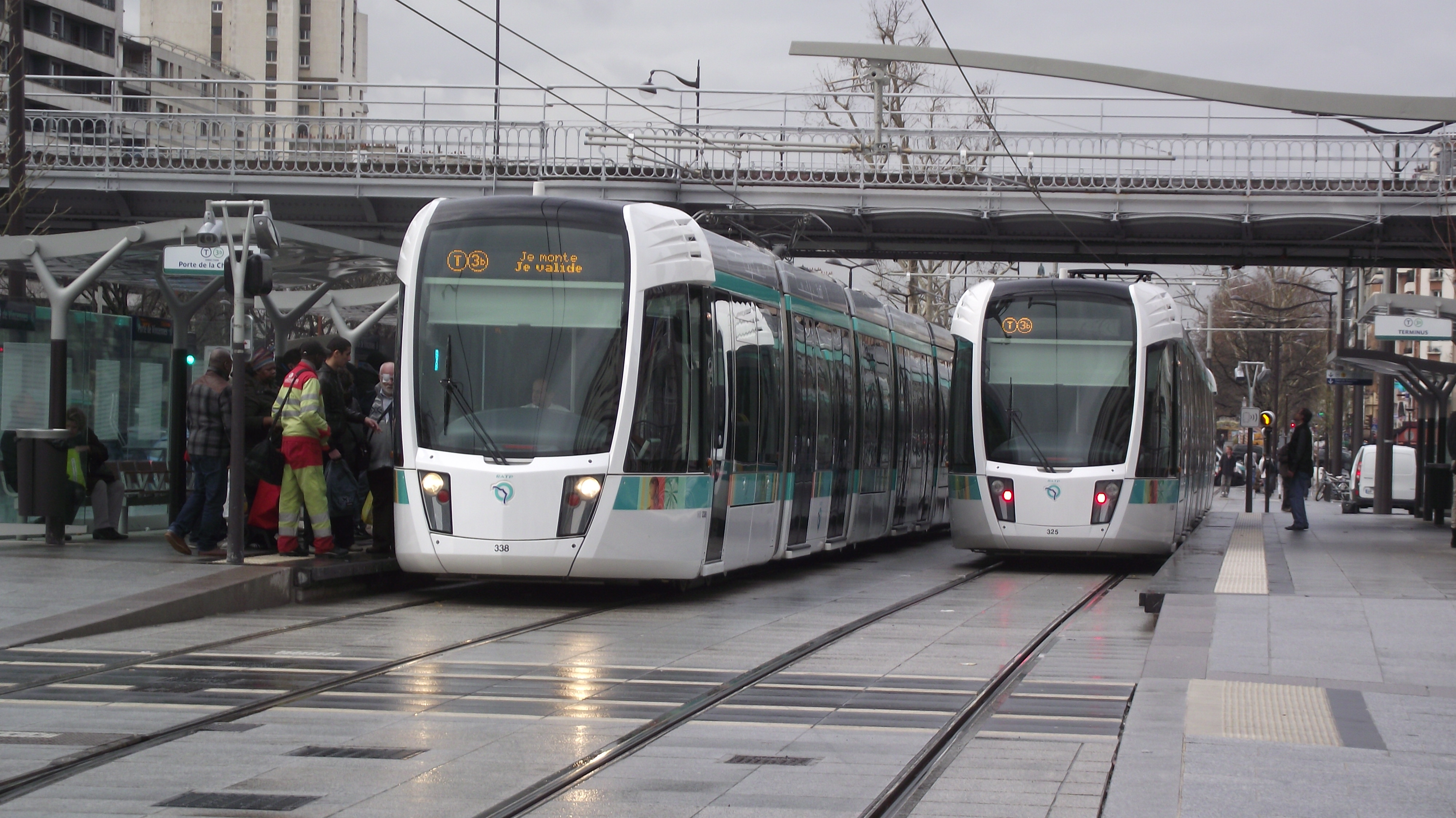 Eindpunt van tramlijn T3b